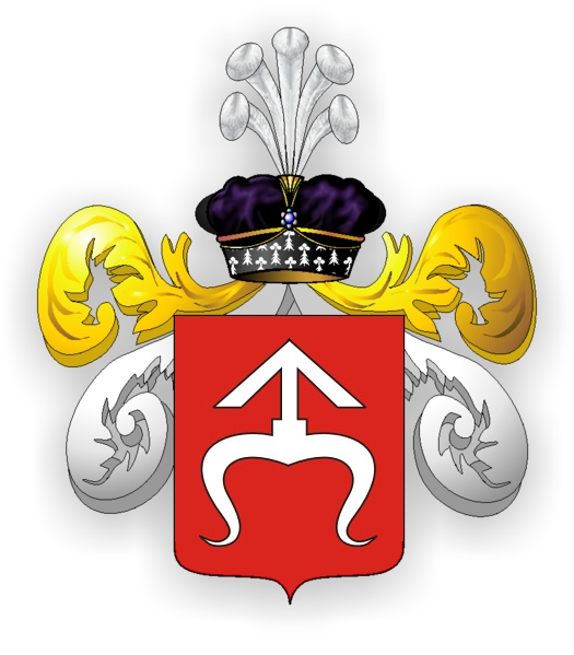 Odrowąż (odmiana hrabiowska Domu Bonaparte)